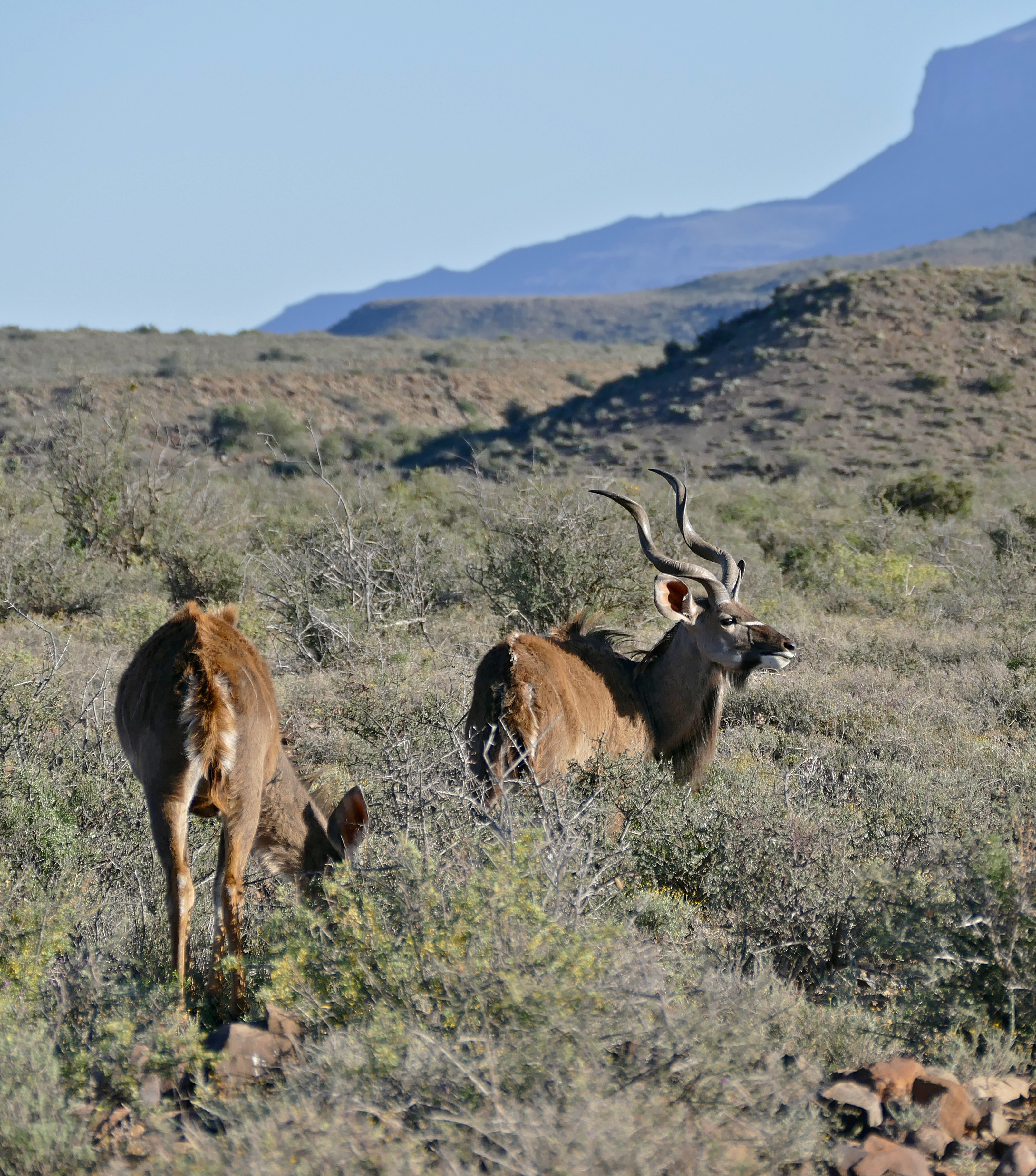 Potlekkertjie Loop, Karoo NP, Western Cape, SOUTH AFRICA